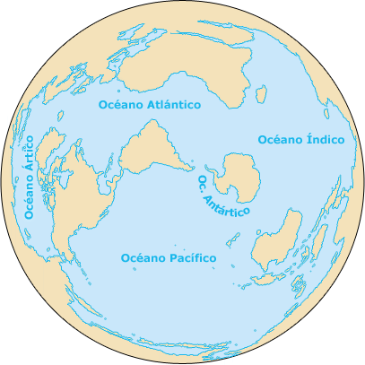 Los 5 océanos de la Tierra